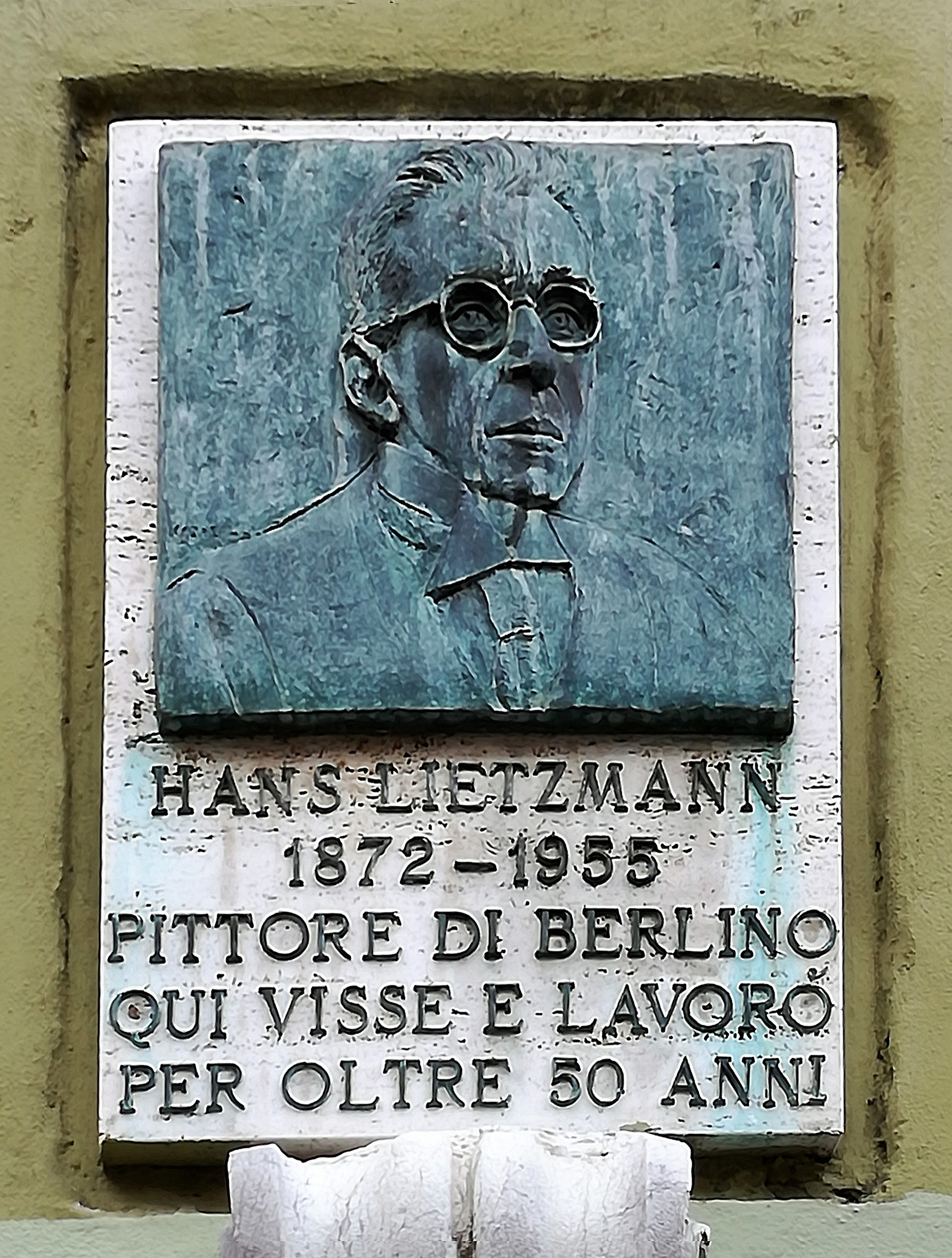 Gedenktafel an Hans Litzmann in Torbole am Gardasee ("Hans Litzmann 1872-1955 Maler aus Berlin der hier mehr als 50 Jahre lebte und arbeitete")